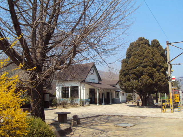 중앙선 구둔역